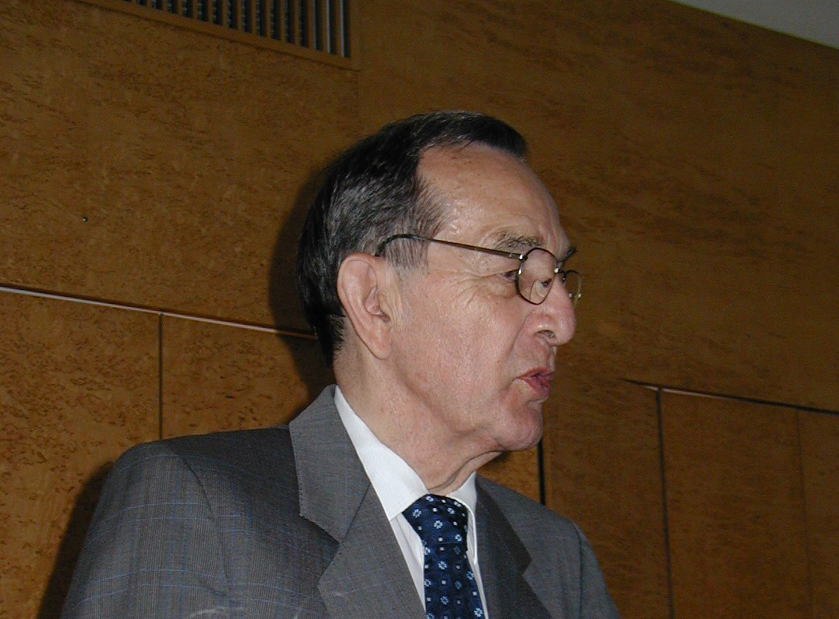 Bertil Wiberg håller tal som så ofta